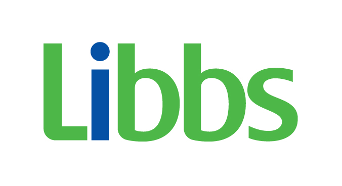 Logo Libbs